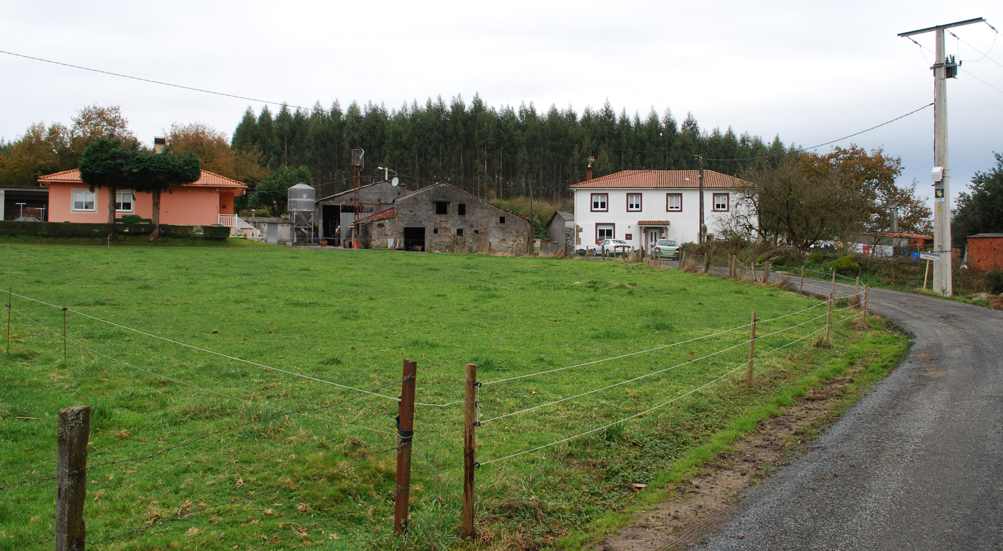 O Pazo de Vilarullo vista xeral Teixeiro Curtis A Coruña Galiza Spain